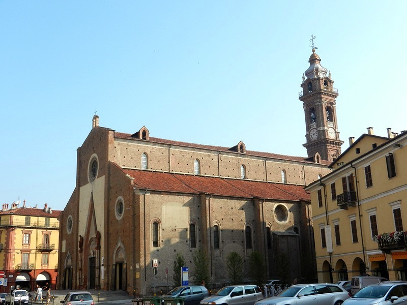 Saluzzo - Duomo